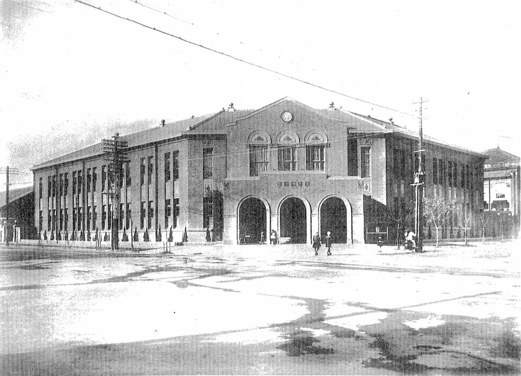 中文（台灣）: 此臺中郵便局為一兩層樓的加強磚造建築，位於台中市寶町一丁目。